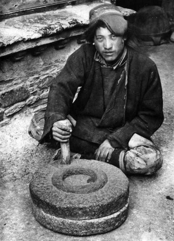 Lhasa, Tibeter beim Bedienen einer tibetischen Hand-Tsambamühle Information added by Wikimedia users.